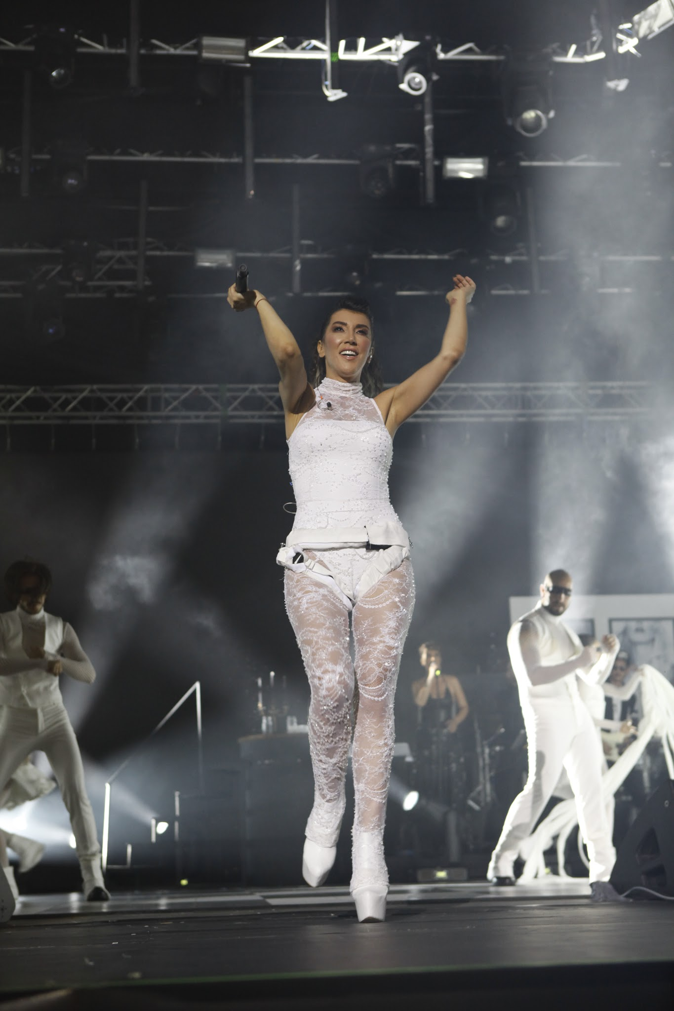 Hande Yener, 31 Temmuz 2015 tarihli Harbiye konserinin "Naber" ile açılışını yaparken.